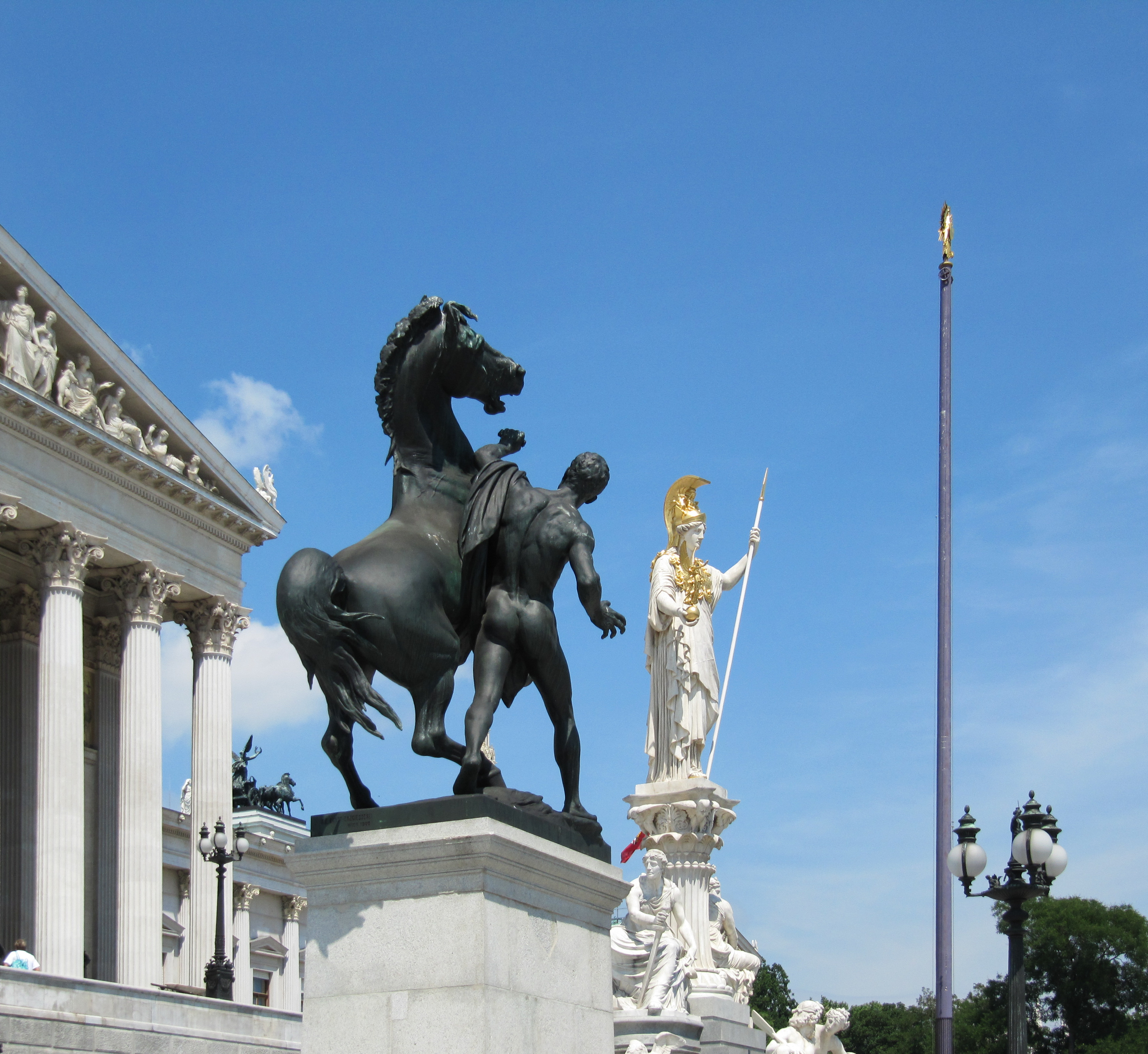 Athéna et le dompteur de chevaux, parlement de Vienne